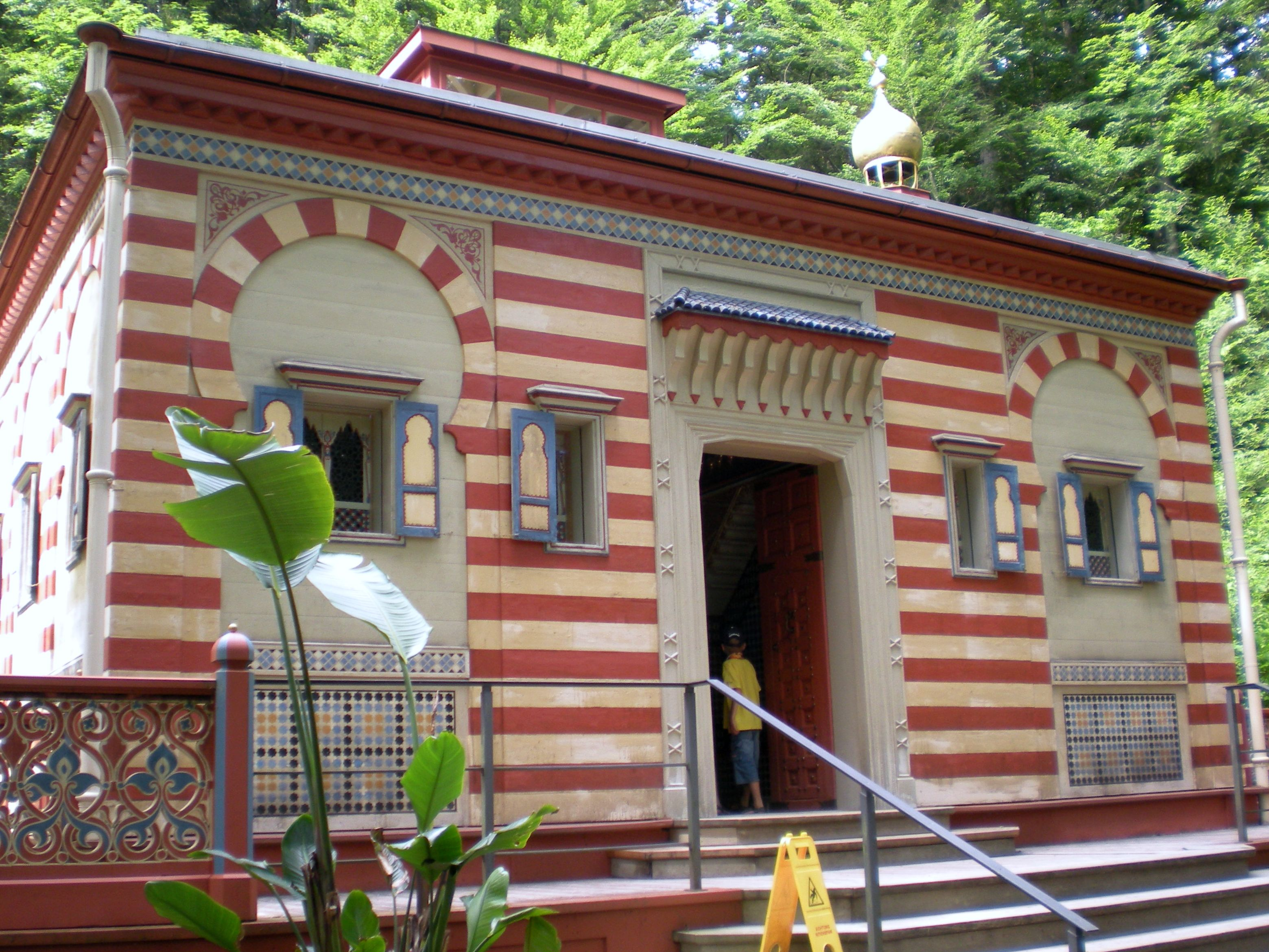 La llamada Casa marroquí fue comprada en la Exposición Universal de París de 1878. Una vez instalada en el parque de Linderhof, se decoró su interior con alfombras y otros objetos.